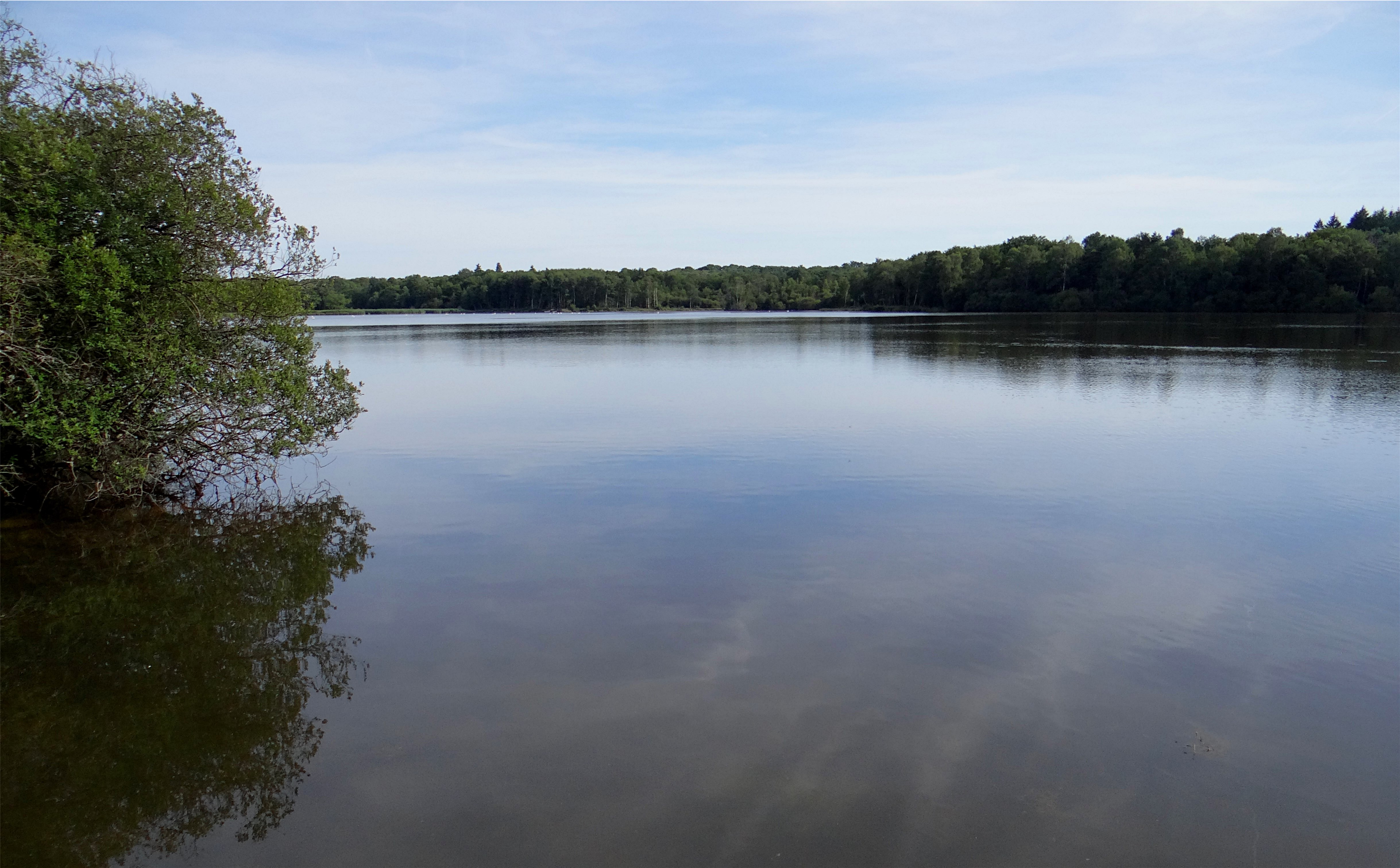 Étang de Vallas, domaine de Mont Evray, Nouan-le-Fuzelier, Loir-et-Cher, France.